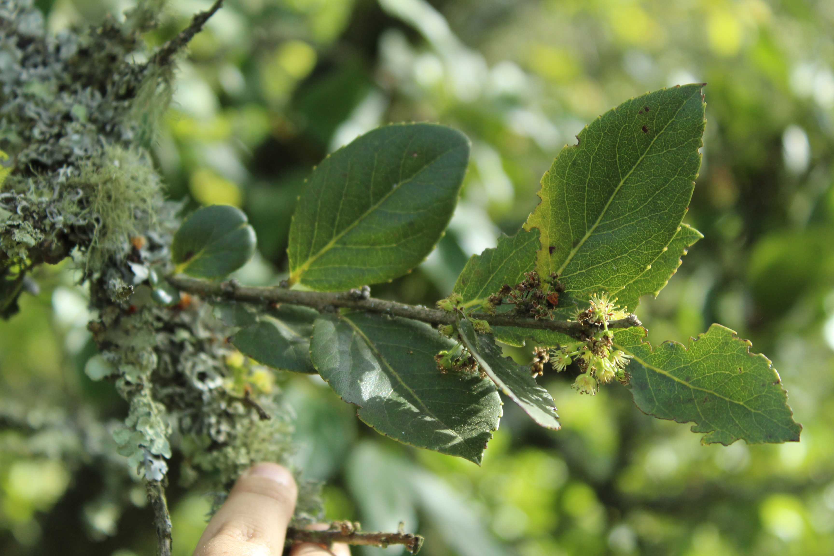 Hojas de Xylosma spiculifera en Santa Rosa de Viterbo, Colombia.